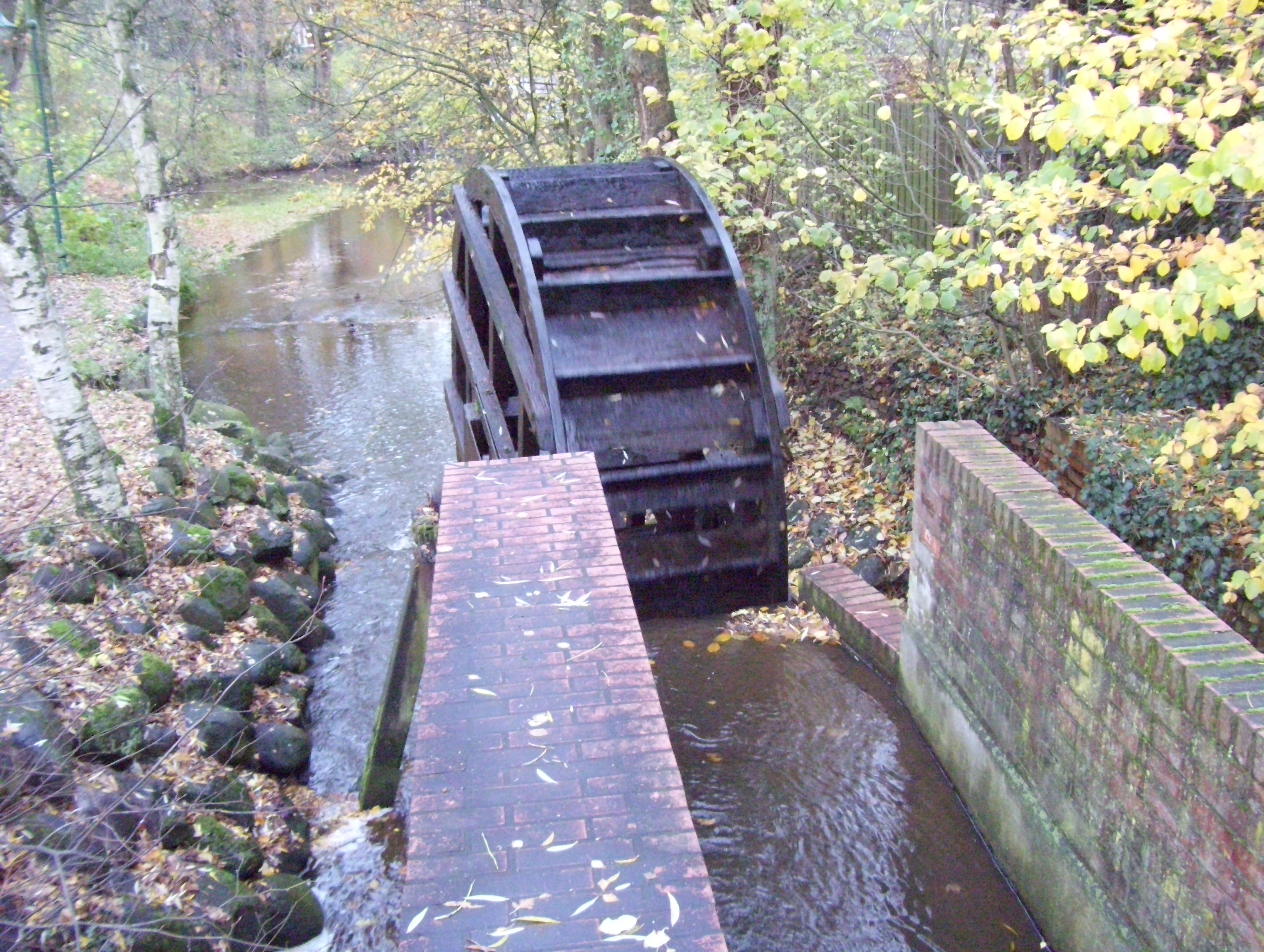 historische Wassermühle in Osterholz-Scharmbeck